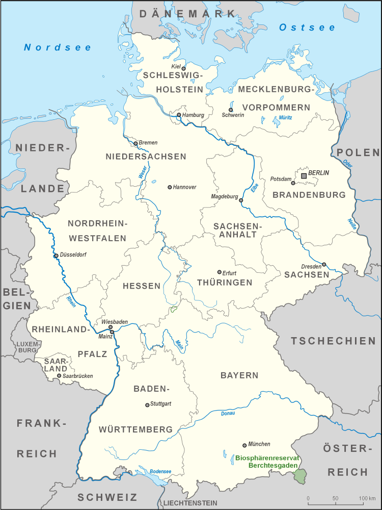 Karte des Biosphärenreservates Berchtesgaden in Deutschland